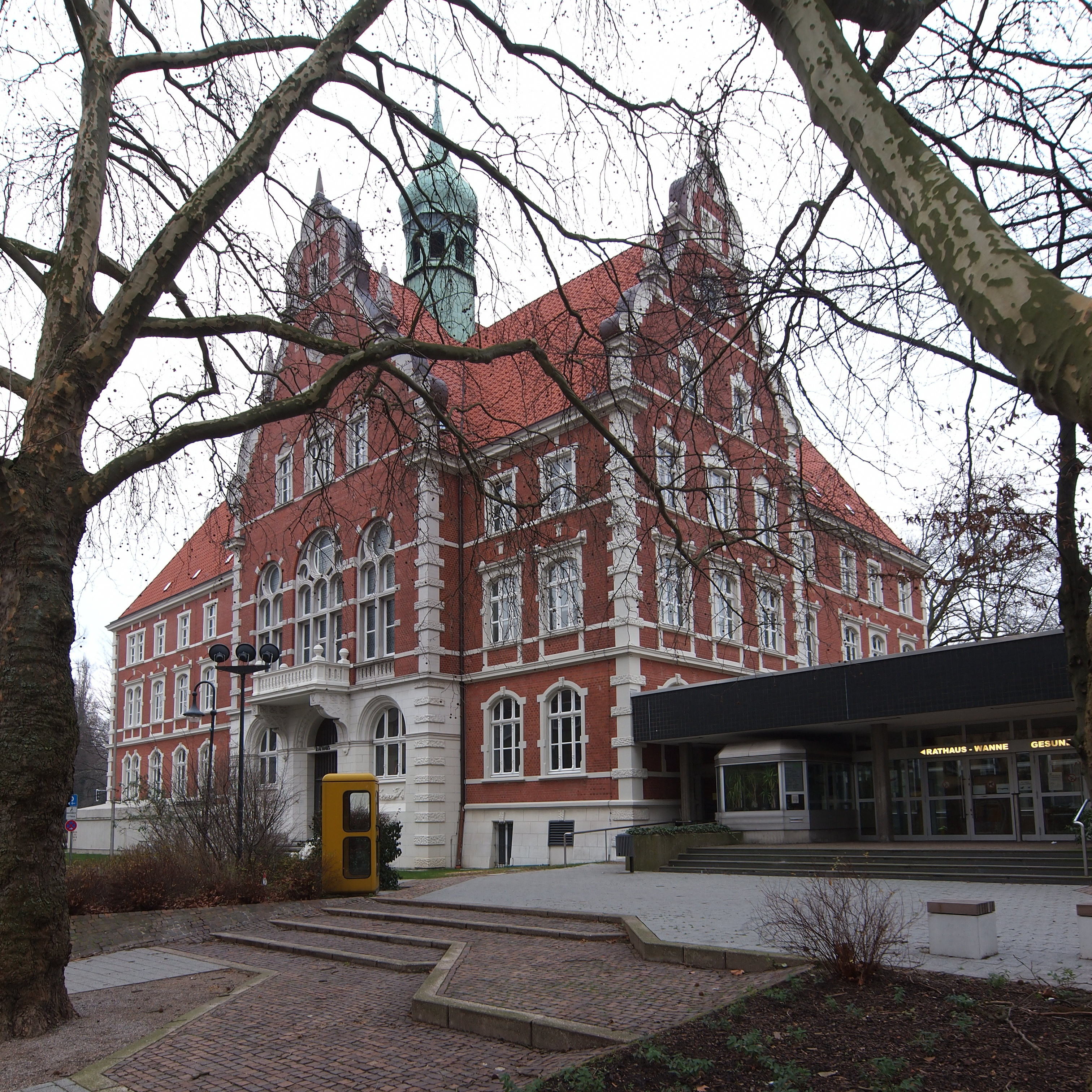 Herne, Rathaus Wanne, Ansicht von Südwesten, Denkmal in Herne-Wanne, Rathausplatz 6